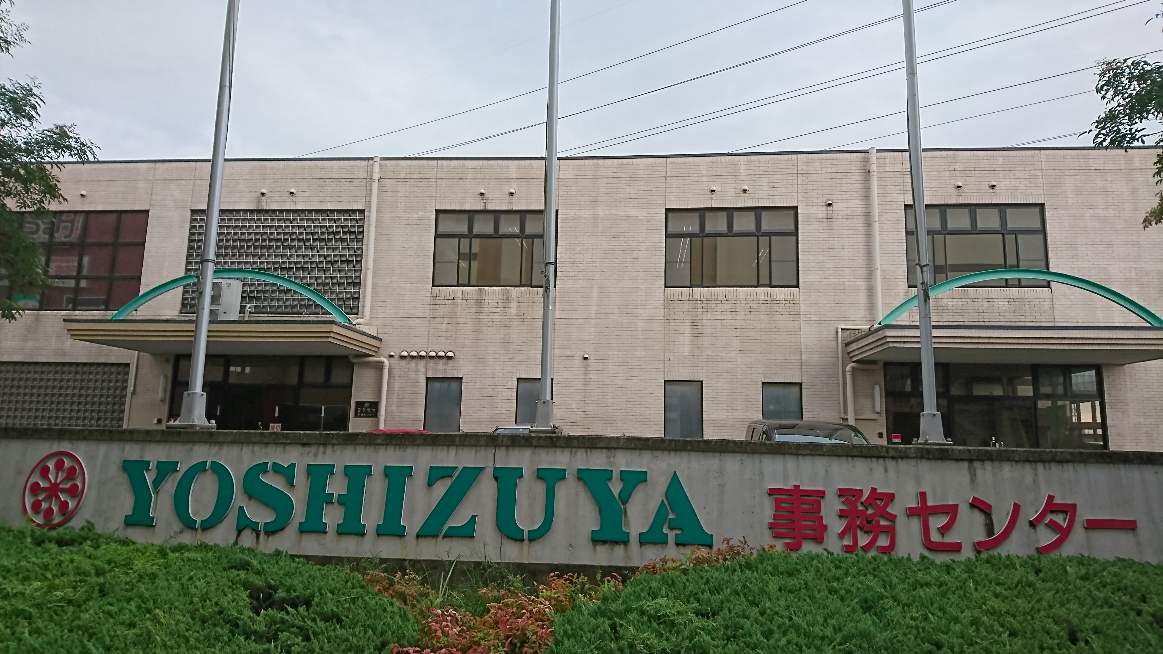 2階建て ヨシヅヤの本社